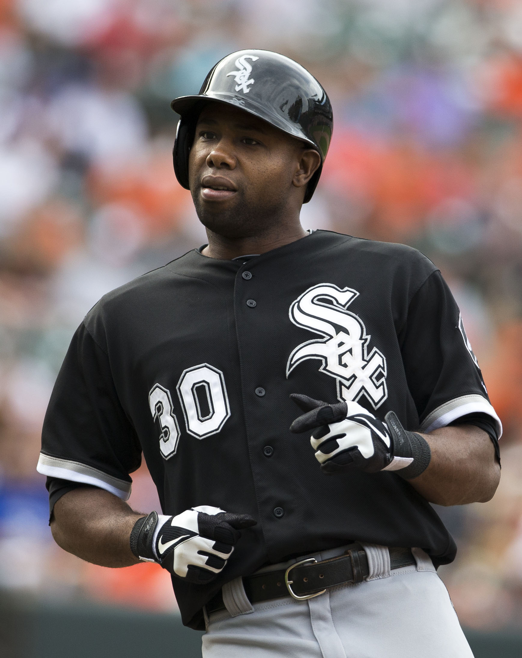 Alejandro De Aza